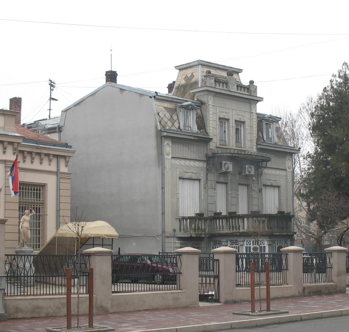 Narodni muzej in Niš, Serbia.